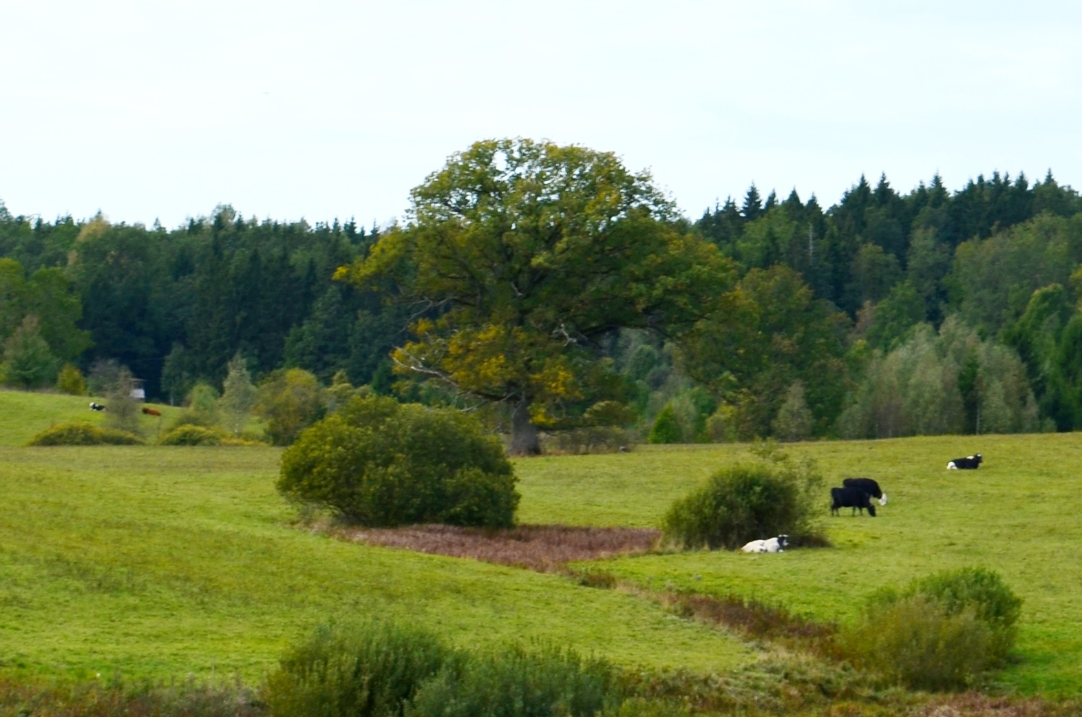 Šventragių ąžuolas nuo plento, Kelmės raj.